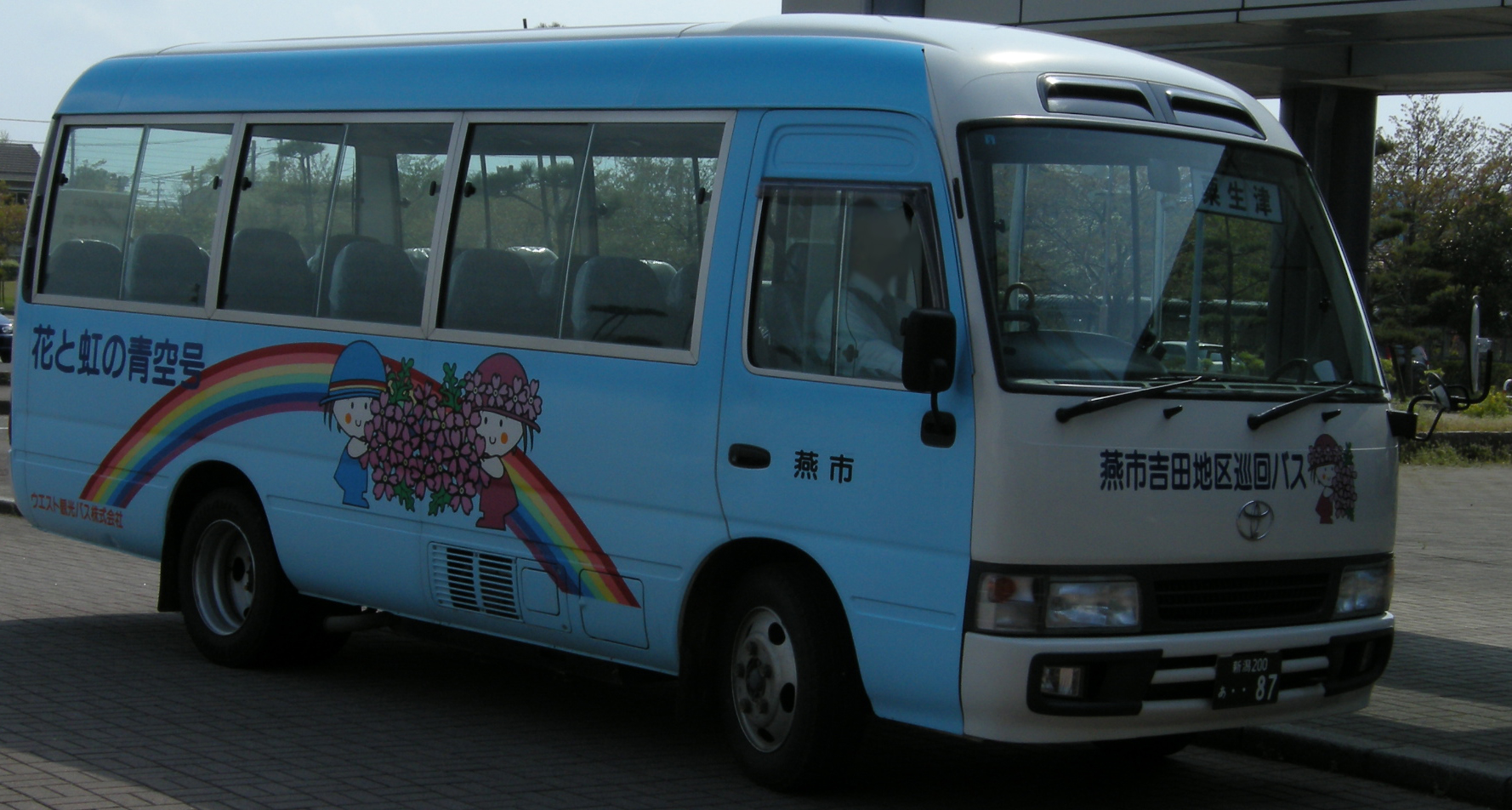 ウエスト観光バス 燕市吉田地区巡回バスの車両